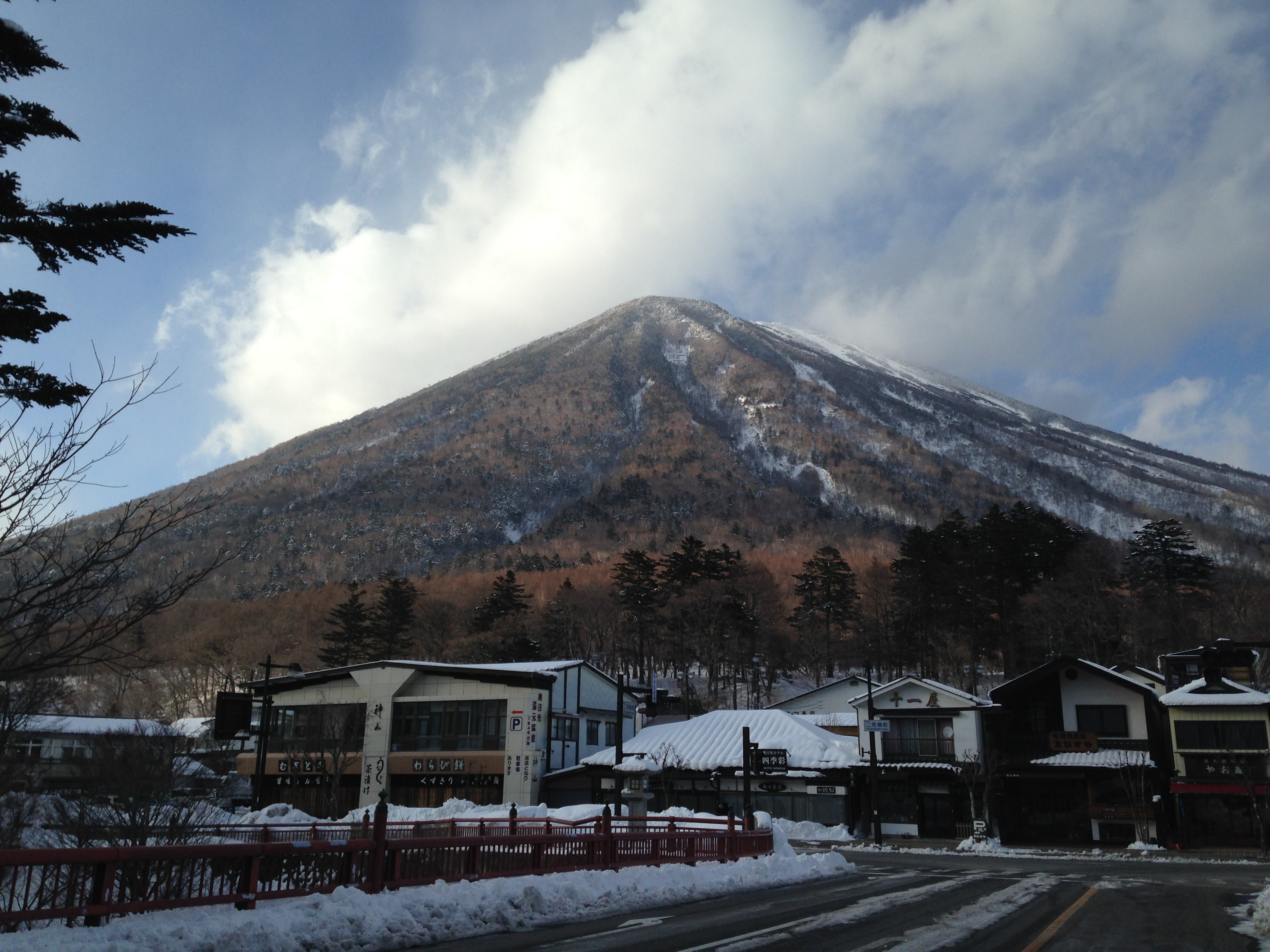 二荒橋より望む男体山